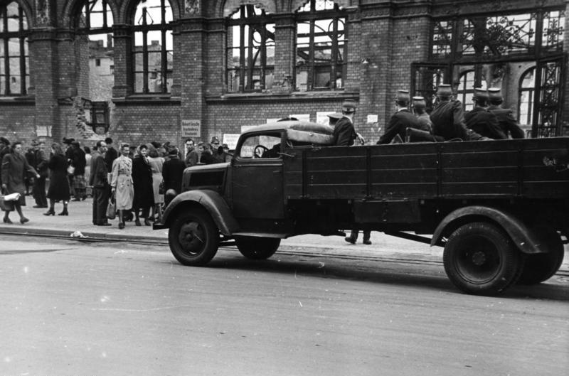 Berlin-Kreuzberg, Schwarzmarkt, Razzia ILLUS Zur Währungsreform in den Westsektoren Berlins. Auf den Schwarzmärkten der Westsektoren herrscht Hochbetrieb. Schon wenige Stunden nach Ausgabe der Westmark wird sie "gehandelt". UBz: Der Schwarzmarkt in der Bergmannstrasse (Bez. Kreuzberg). "Polizei kommt!" ADN-ZB 1948: Die Westsektoren nach der Durchführung der separaten Währungsreform. Razzia der Polizei auf dem "Schwarzen Markt" in der Bergmannstraße im Bezirk Kreuzberg, wo die Spalterwährung gehandelt wird. 1692-48